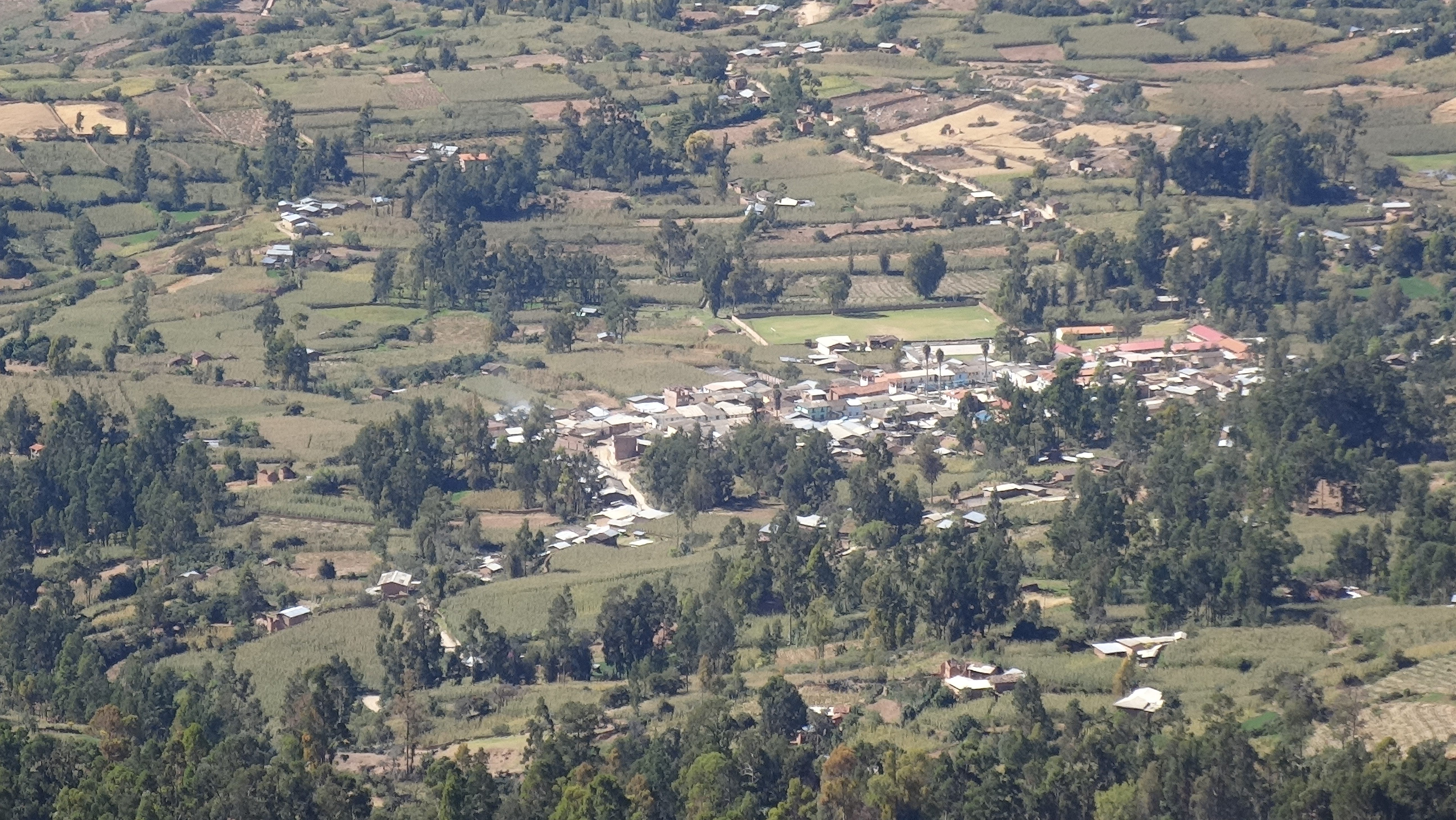 Vista desde el cerro Pahuacoto.